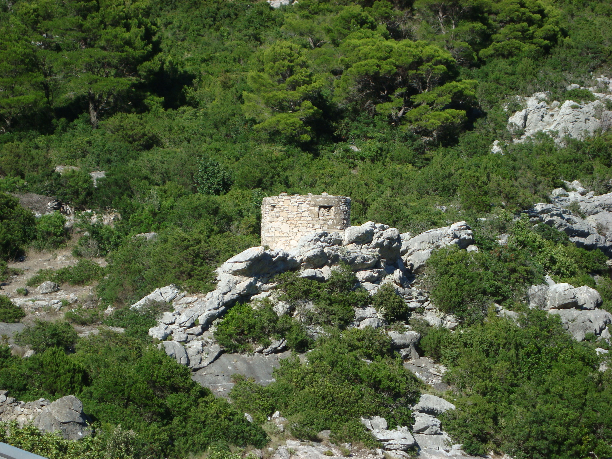 Obrambena kula, koju su izgraditi Talijani u Drugom svjetskom ratu kraj Sobre na Mljetu, Hrvatska